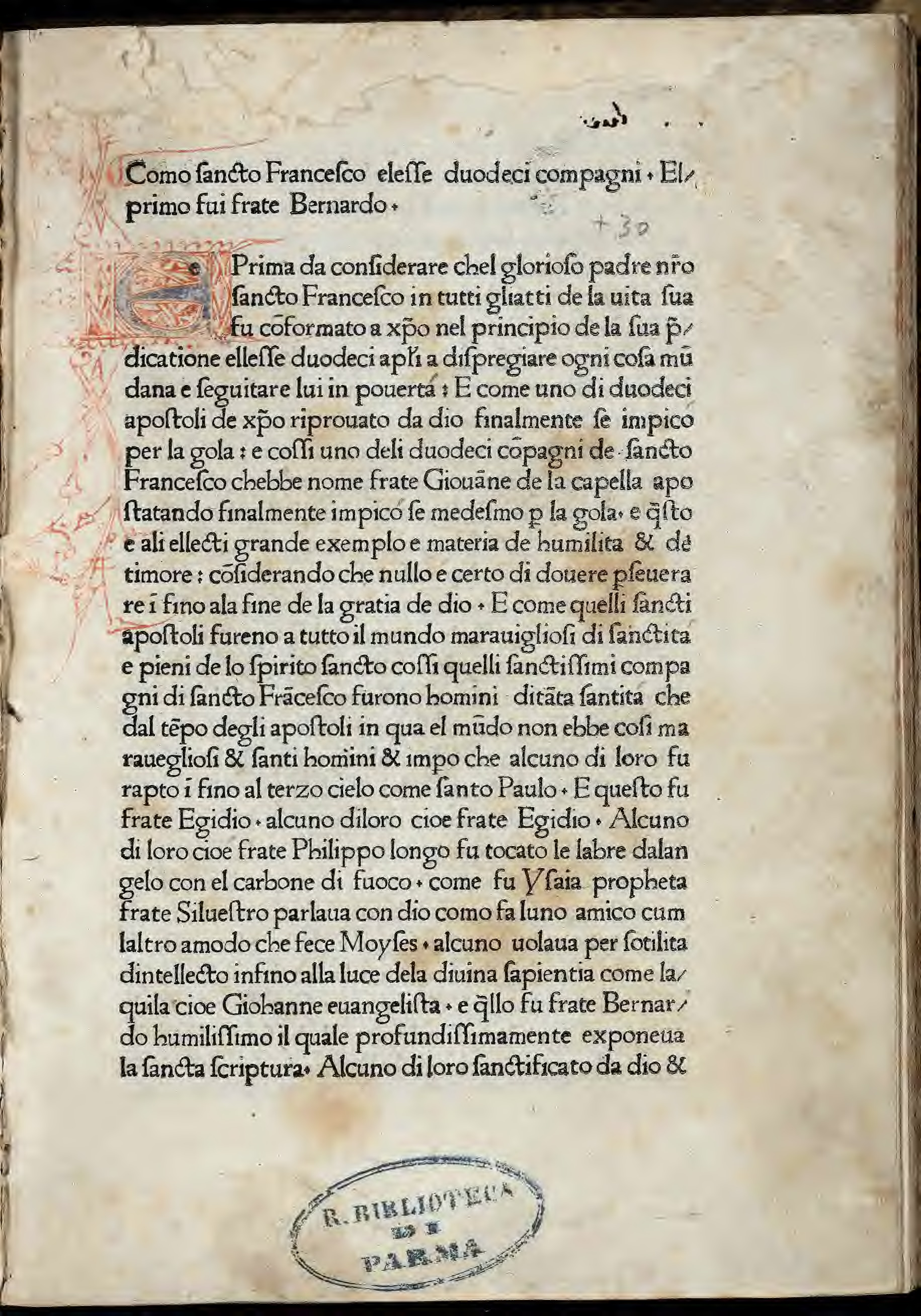 Fioretti. - [Milano] : [Domenico da Vespolate], [1476-1479]. - 90 c. [A-F]⁸, G-K⁸, [L]¹⁰ ; 4º. - A. Ganda, Il "tipografo del Servius H 14708" ha un nome: D. G. da Vespolate, in La Bibliofilia 87 (1985), pp. 227-266 . Incipit: Como sancto